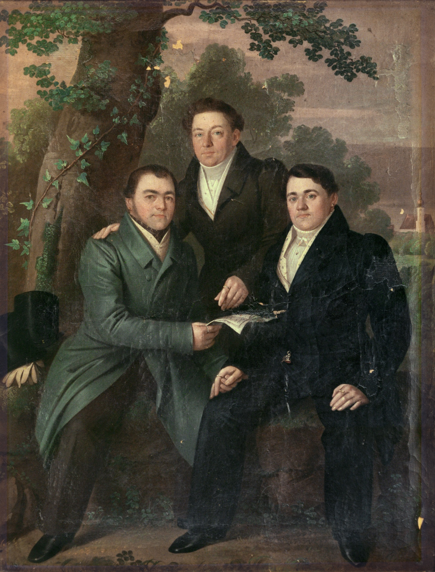 Die Sensengewerken Caspar Zeitlinger (links) und Johann Michael Zeitlinger (rechts) mit Großkaufmann und Sensenhändler Georg Redtenbacher vulgo Lahmayr (stehend).